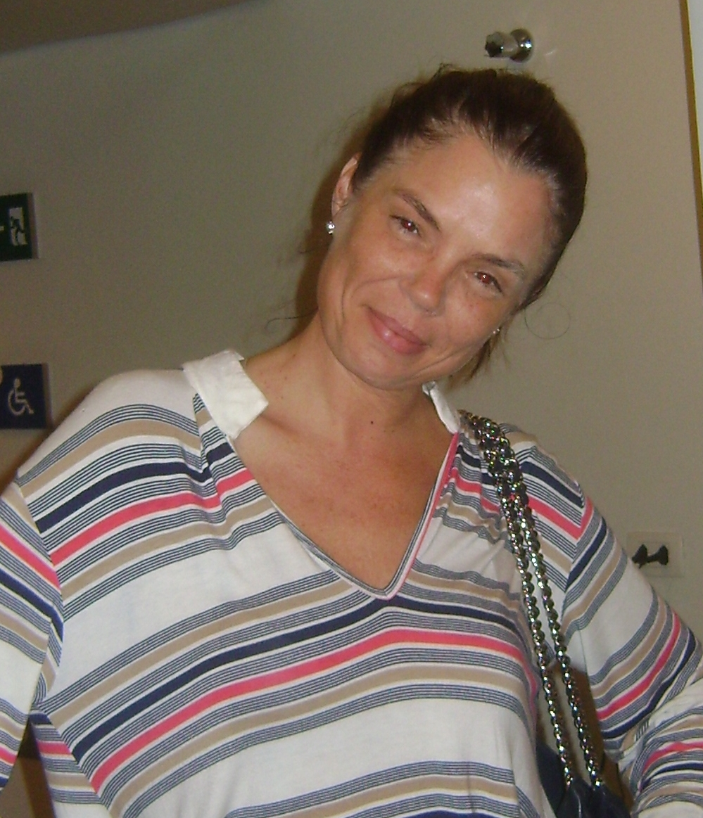 Alexia Dechamps, atriz brasileira, após a apresentação da peça "Filha, Mãe, Avó e Puta - Uma Entrevista", em São Paulo.